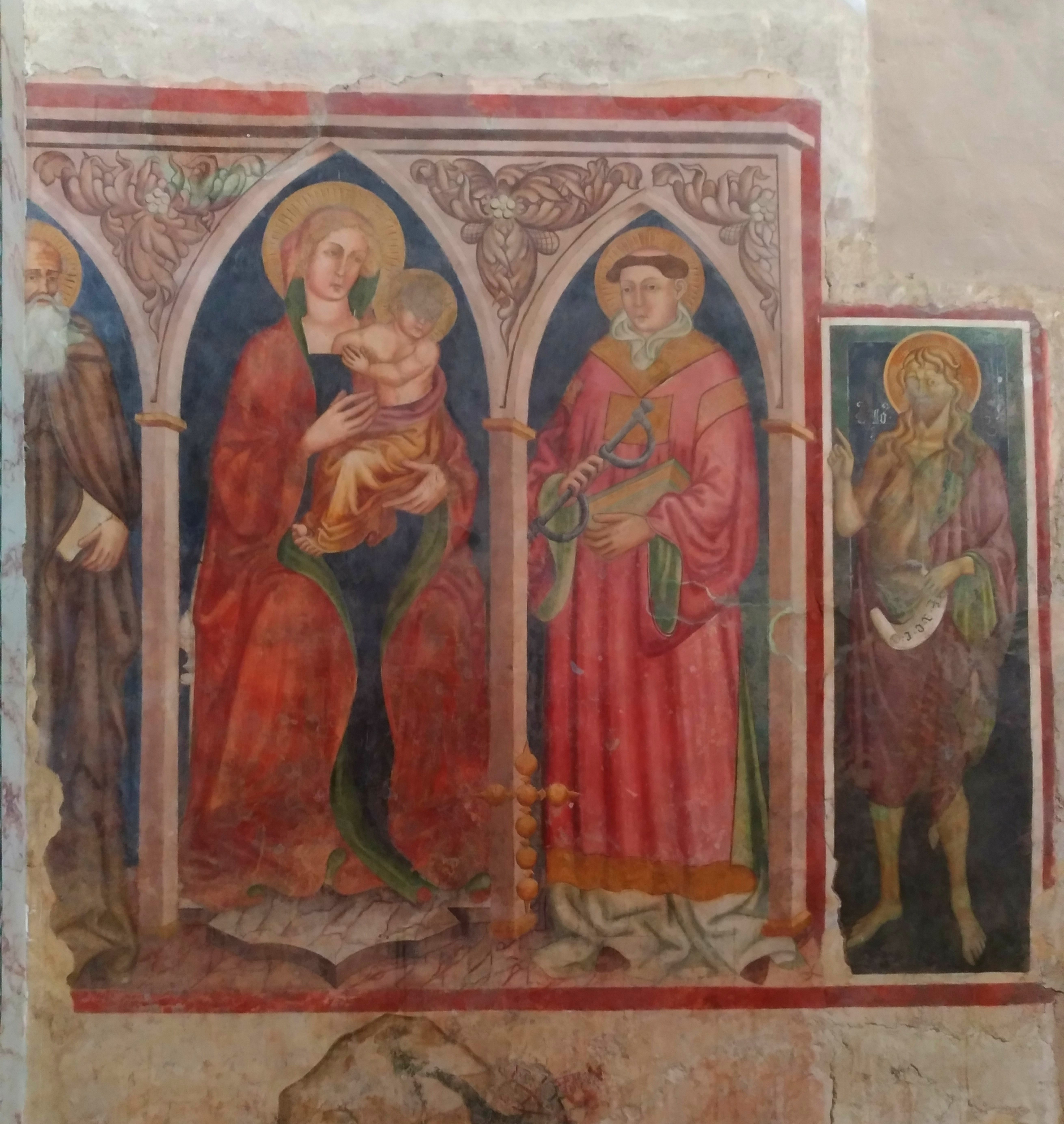 Chiesa di San Francesco (Alatri), affreschi della parete destra